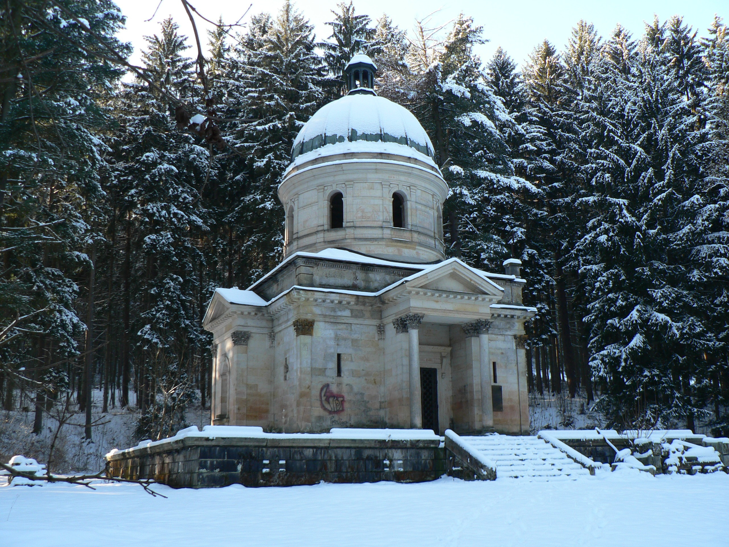 Hrobka rodiny Kleinů v Sobotíně